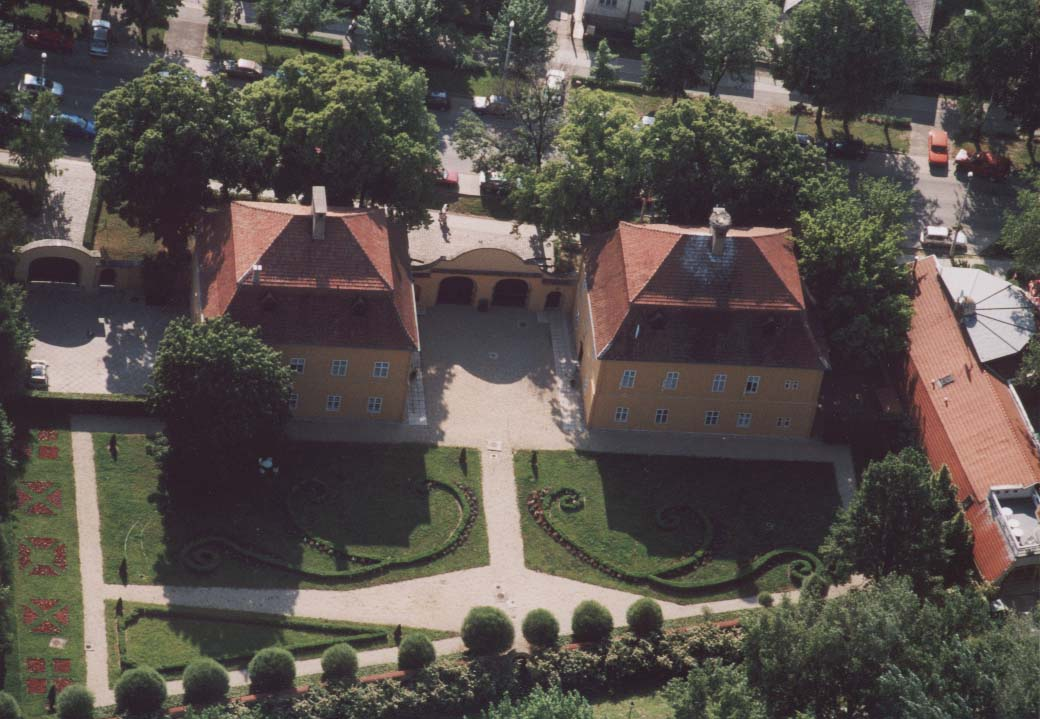 Palace - Tokaj - Hungary - Europe